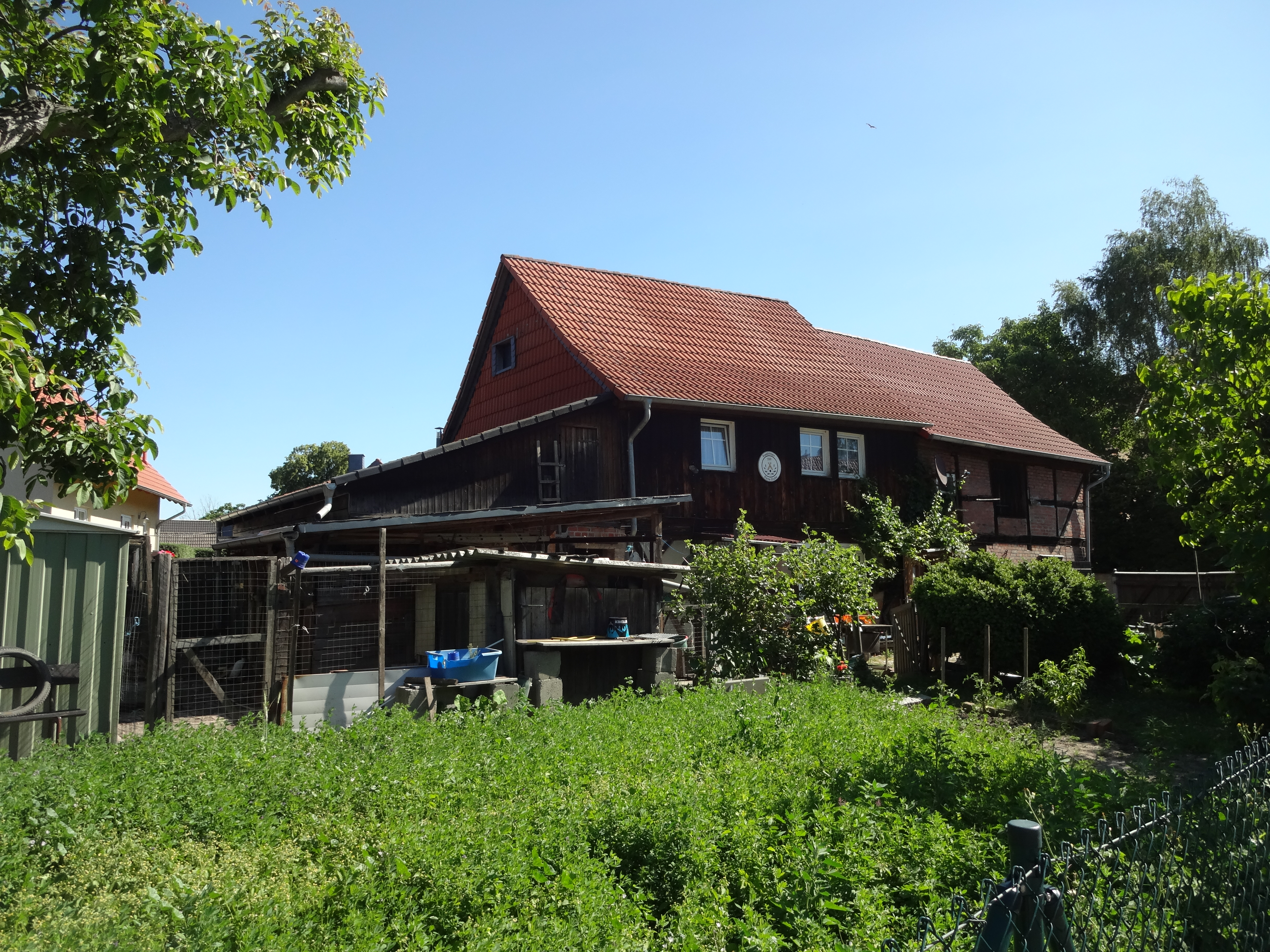 ehemals denkmalgeschütztes Bauernhaus in der Schmiedestraße 8 in Langeln, Gemeinde Nordharz